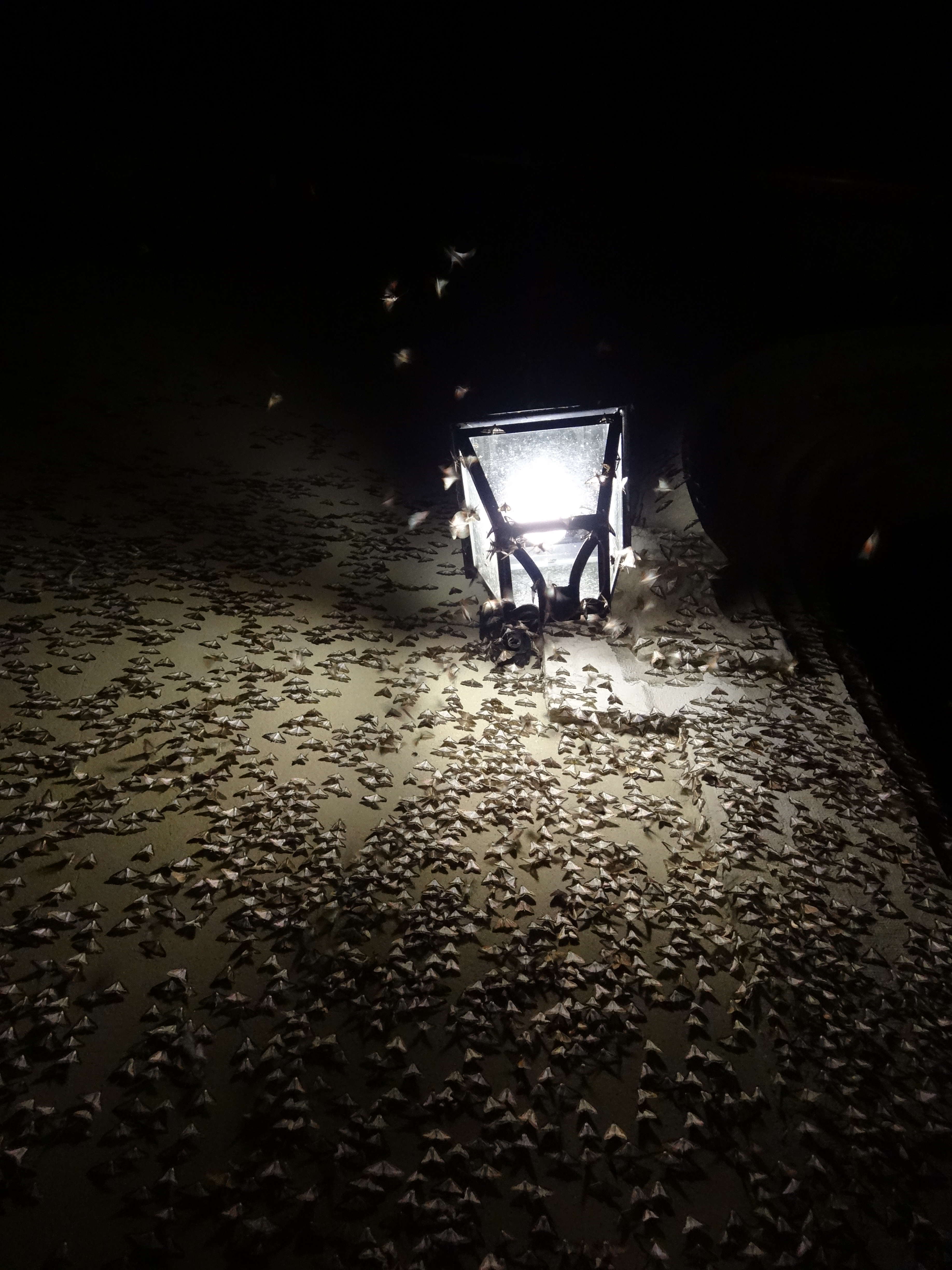 Invasion de pyrale du buis (Cydalima perspectalis). Saint-Rambert-en-Bugey, 2016